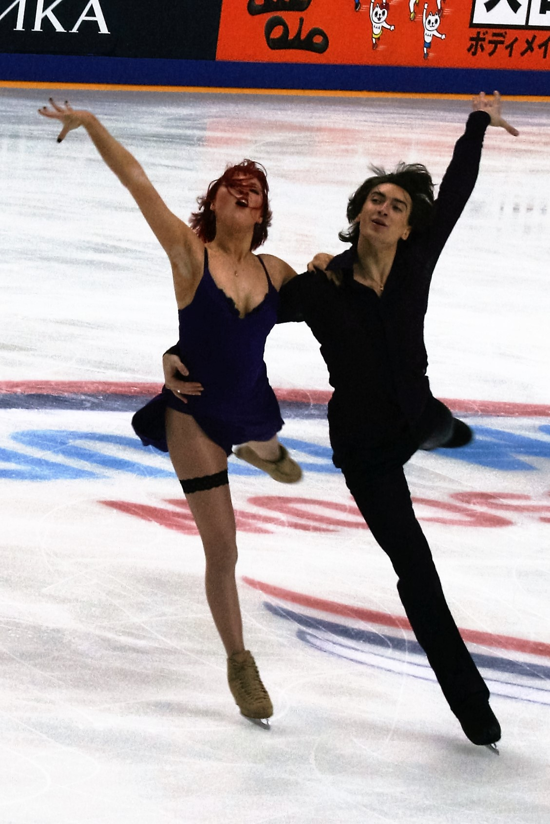 Тиффани Загорски и Джонатан Гурейро (Россия) на Кубке Ростелекома 2016